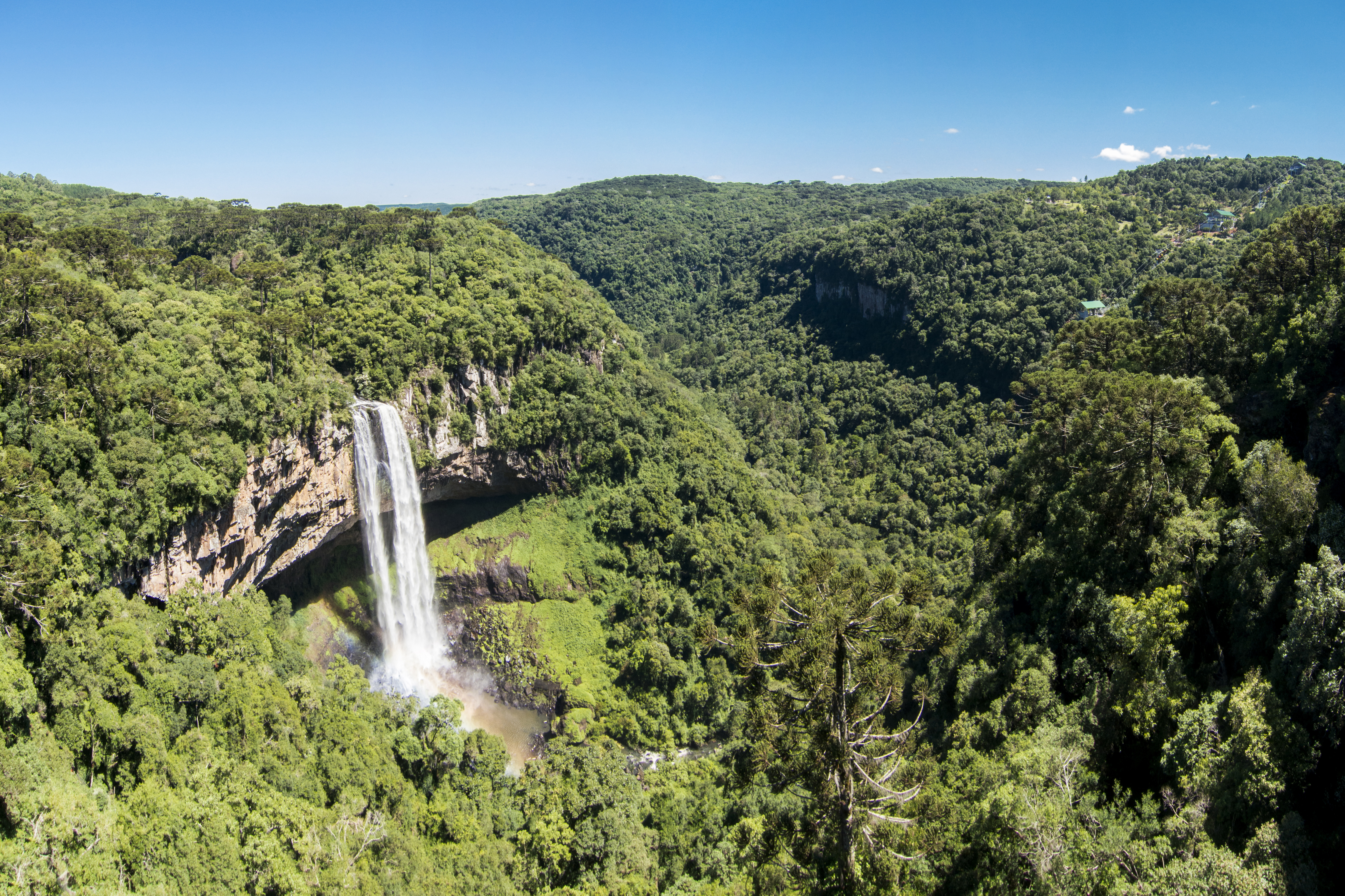 Parque Estadual do Caracol